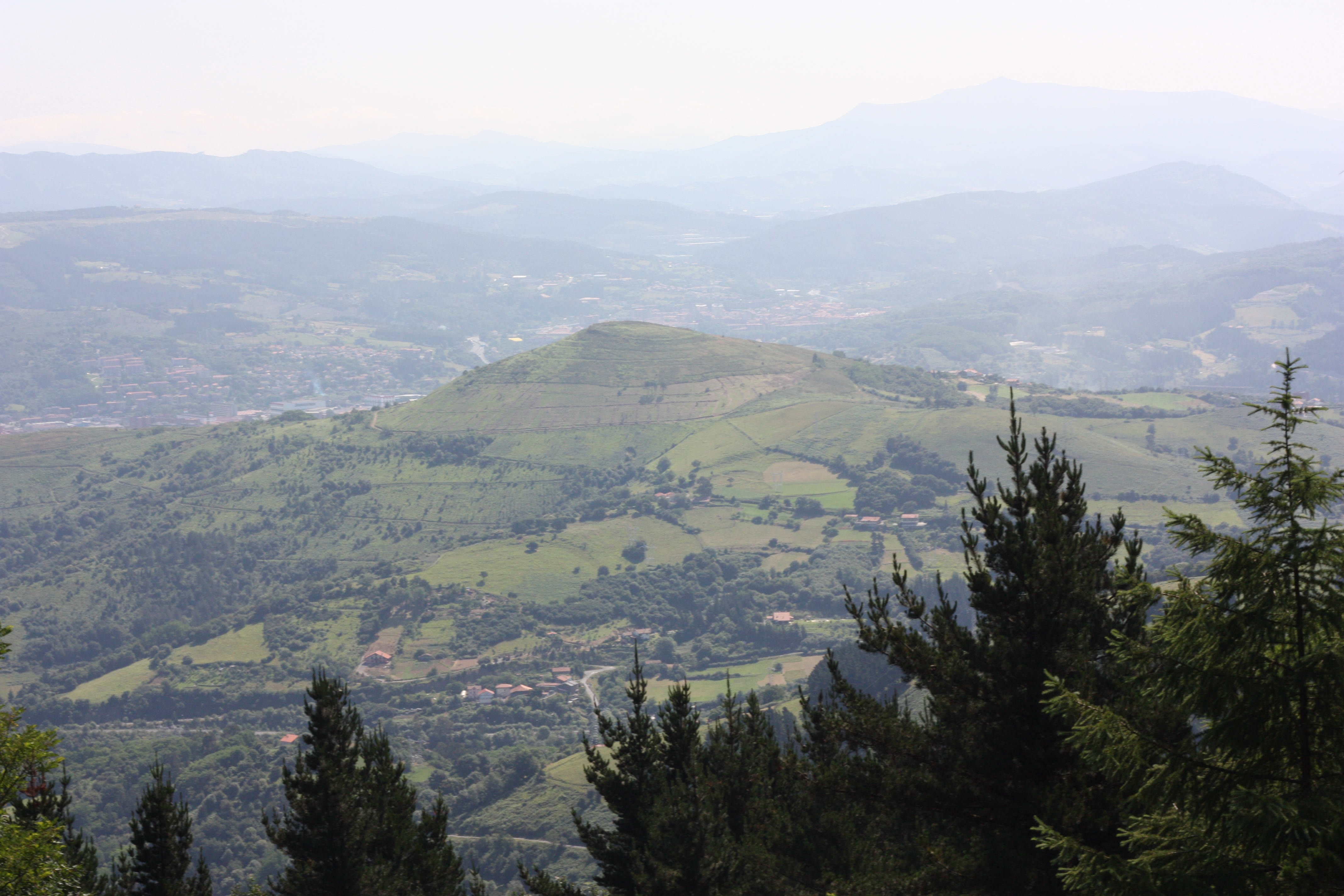 Malmasin mendia.